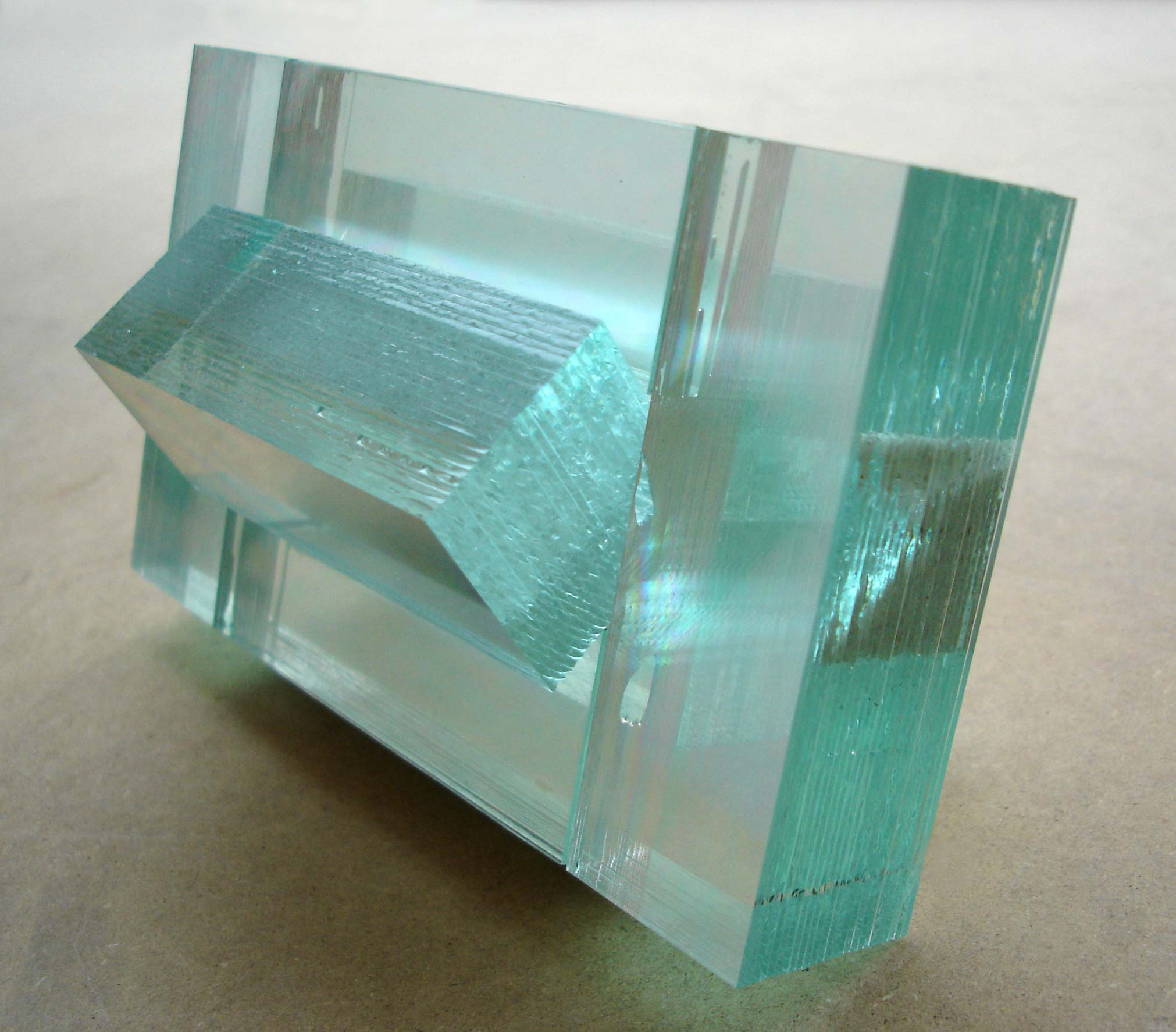 Edition 1 aus Reihe organisch/anorganisch, 2006